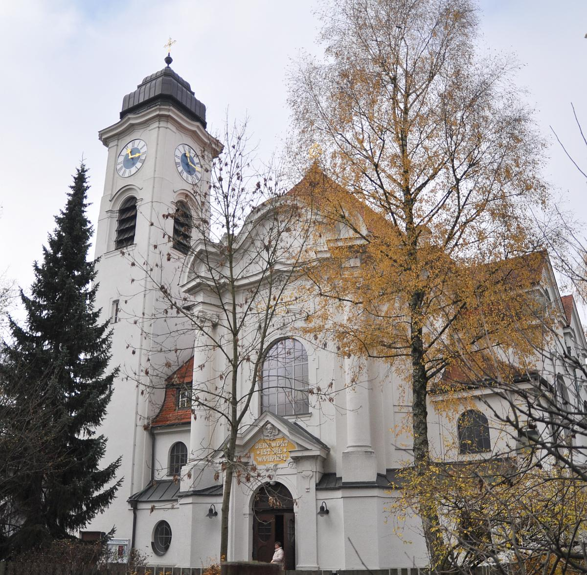 Außenansicht der Himmelfahrtskirche München Pasing.